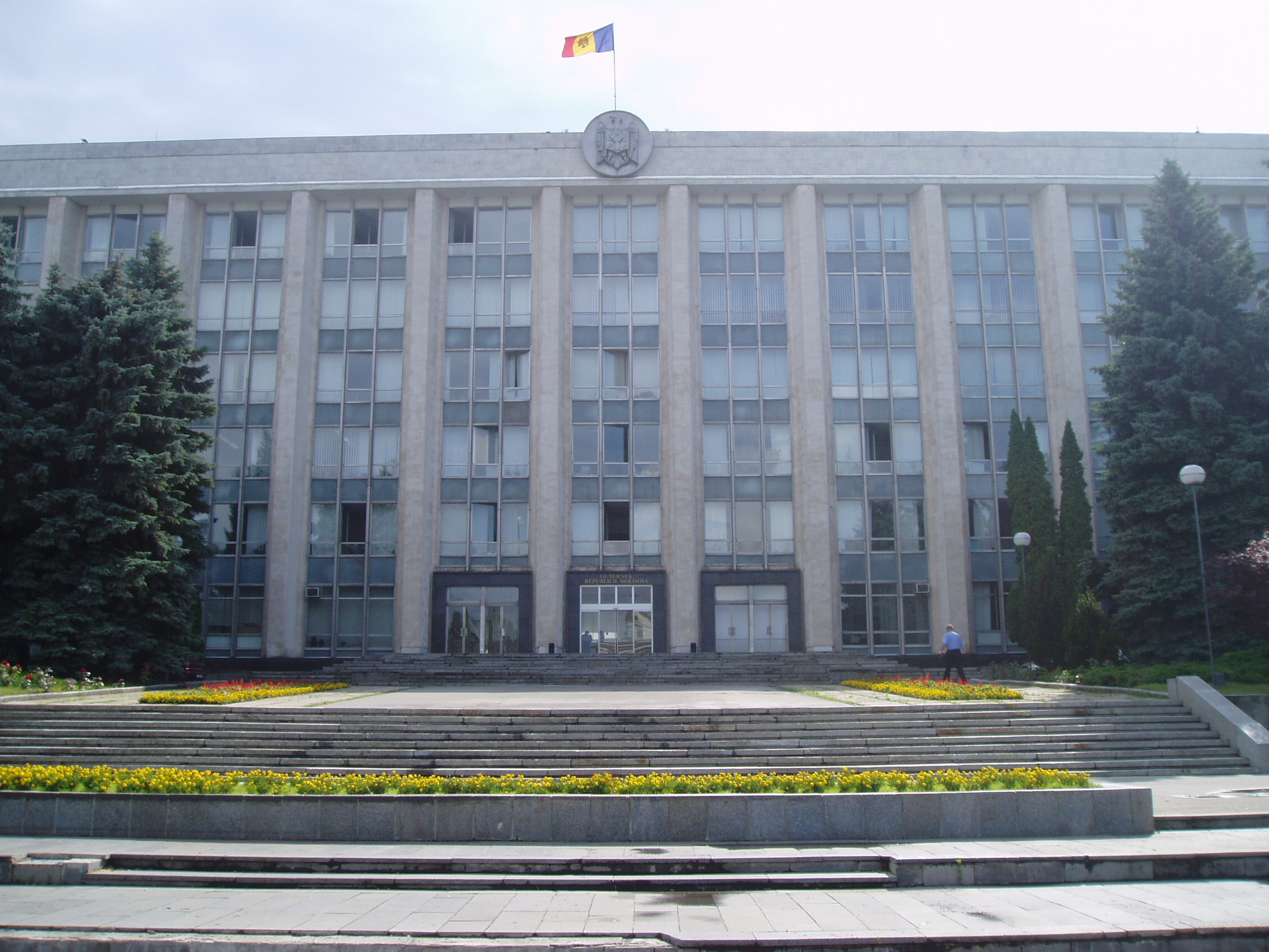 Government Building, Chișinău, Moldova